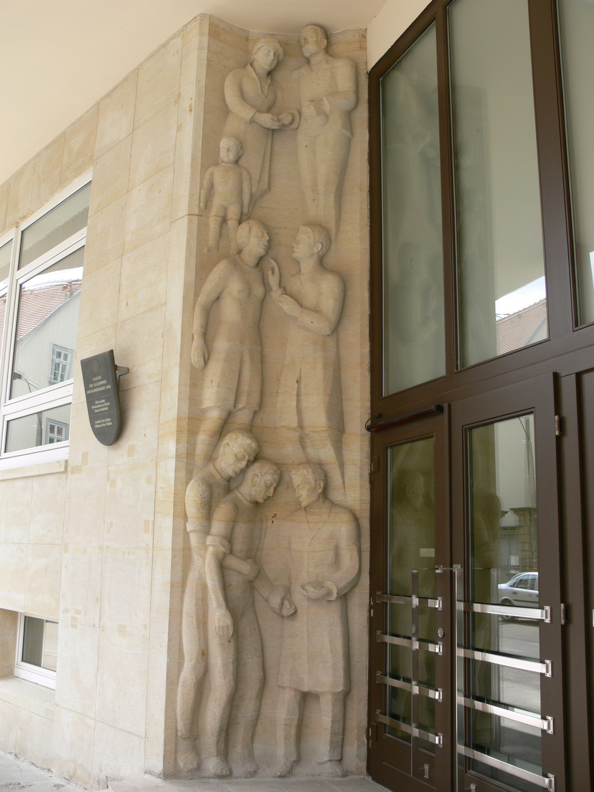 Erfurt, Augustinerstraße 38, Gebäude der Allgemeinen Ortskrankenkasse (AOK), Reliefs Hans Walther an der linken Seite des Haupteingangs: Verkörperung der Abteilungen Unfallstelle, Zahnklinik und Auszahlung des Kindergeldes